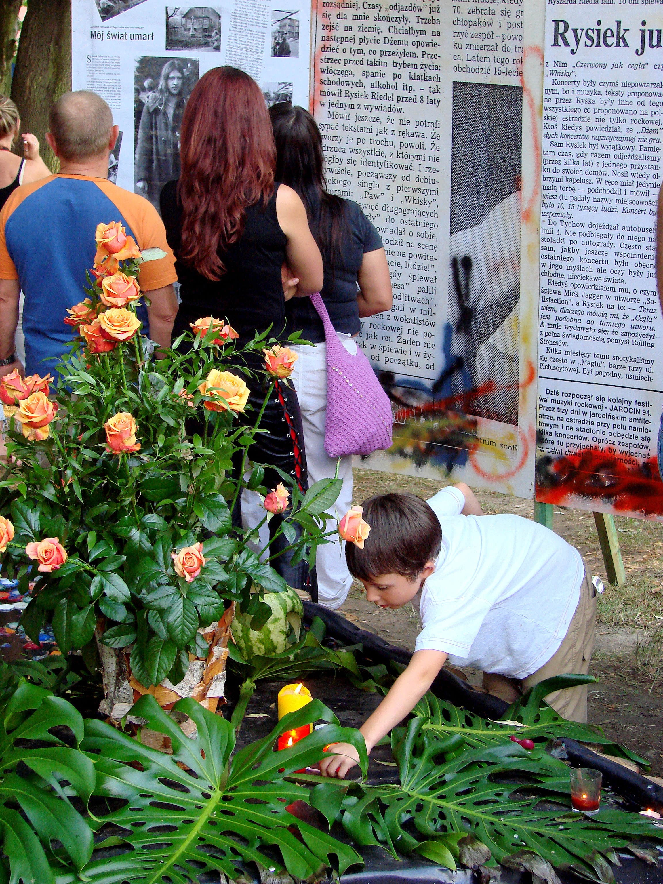 festiwal Ryśka. Czytanie wspomnień o Ryśku oraz zapalanie świec.